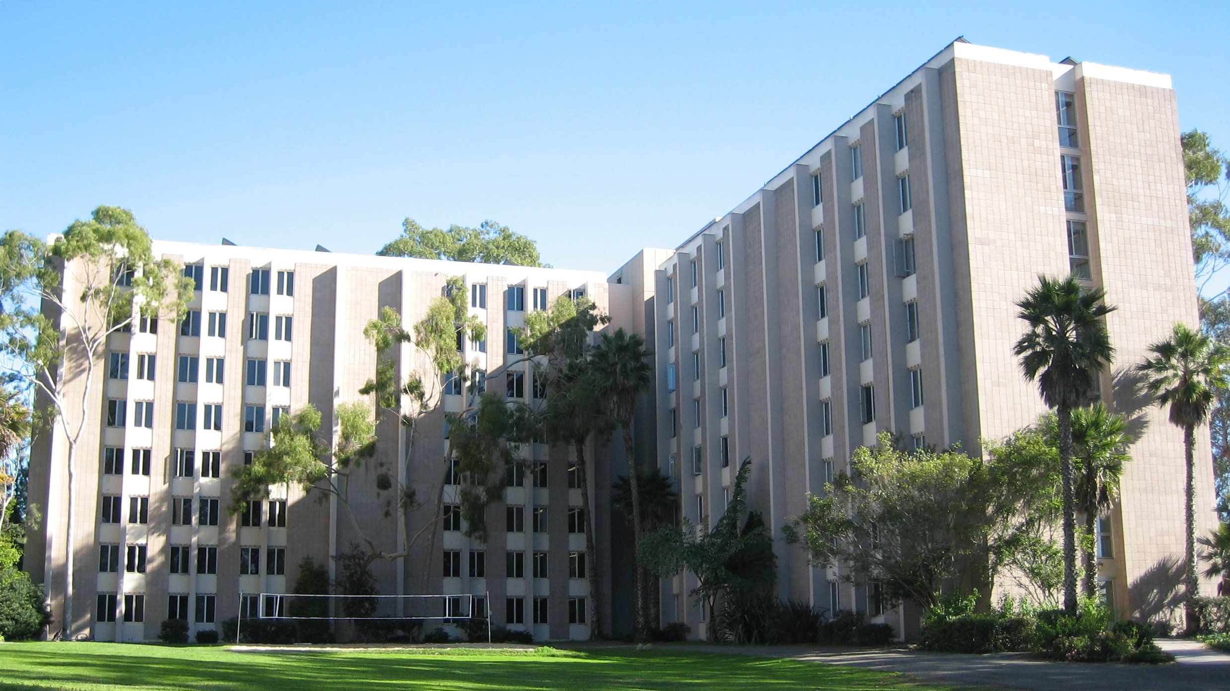 San Nicolas student dorm, UCSB